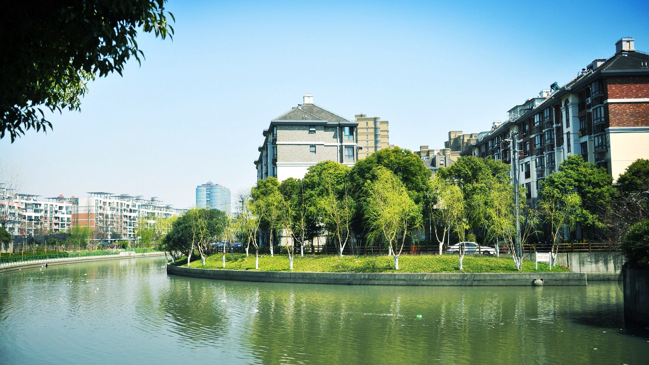 枫桥湾 淞南镇